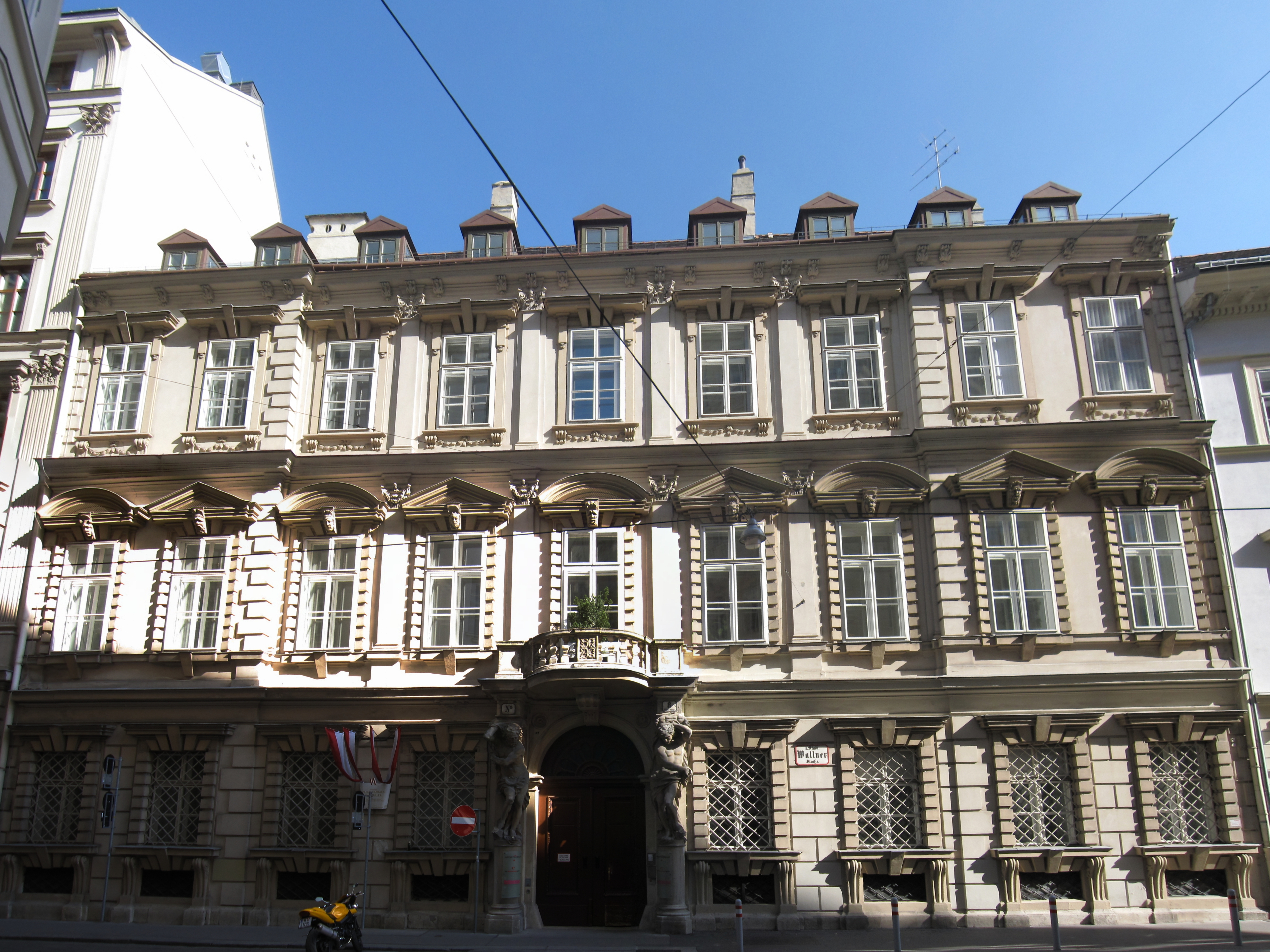 Palais Caprara-Geymüller